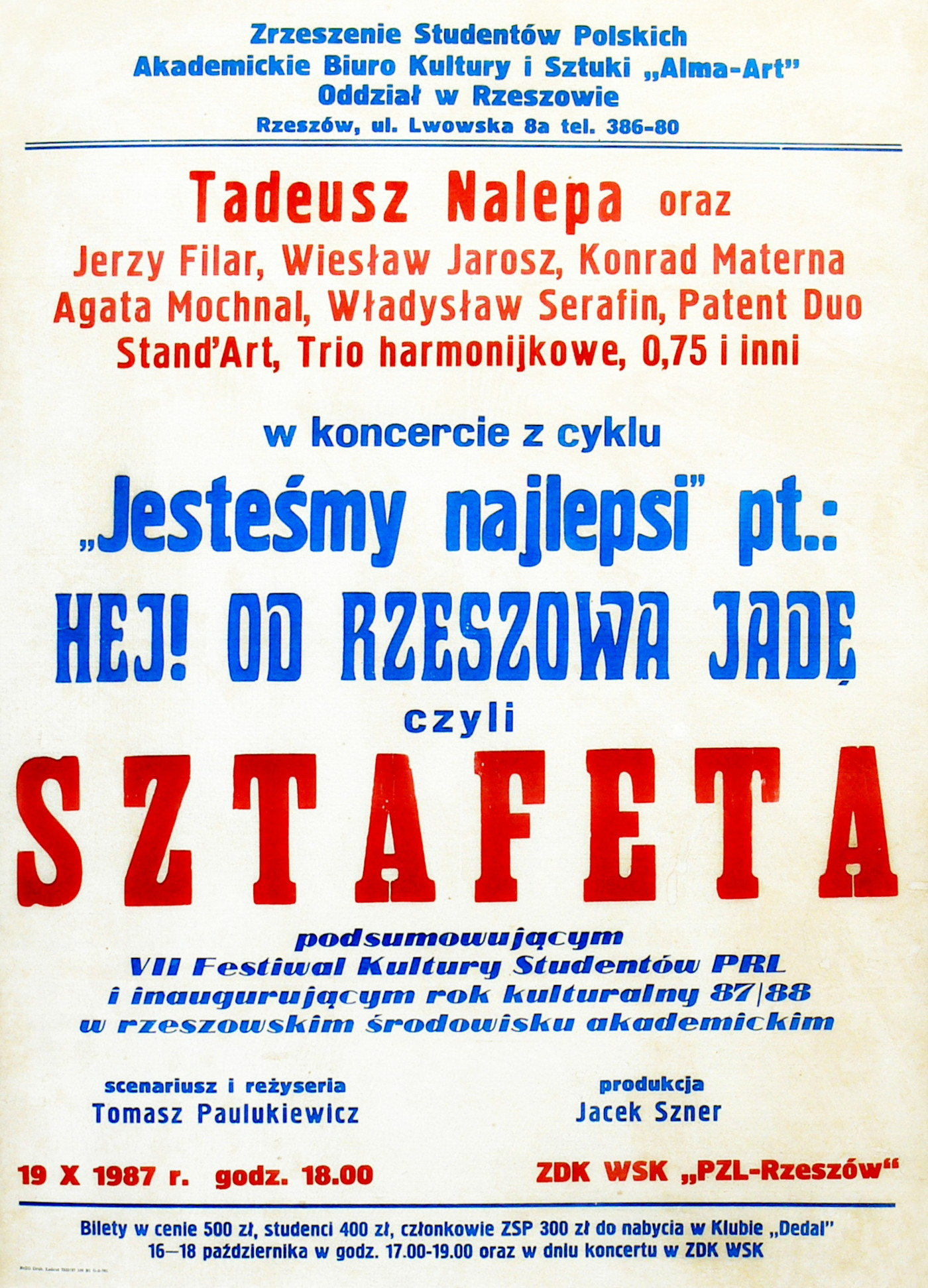 Plakat